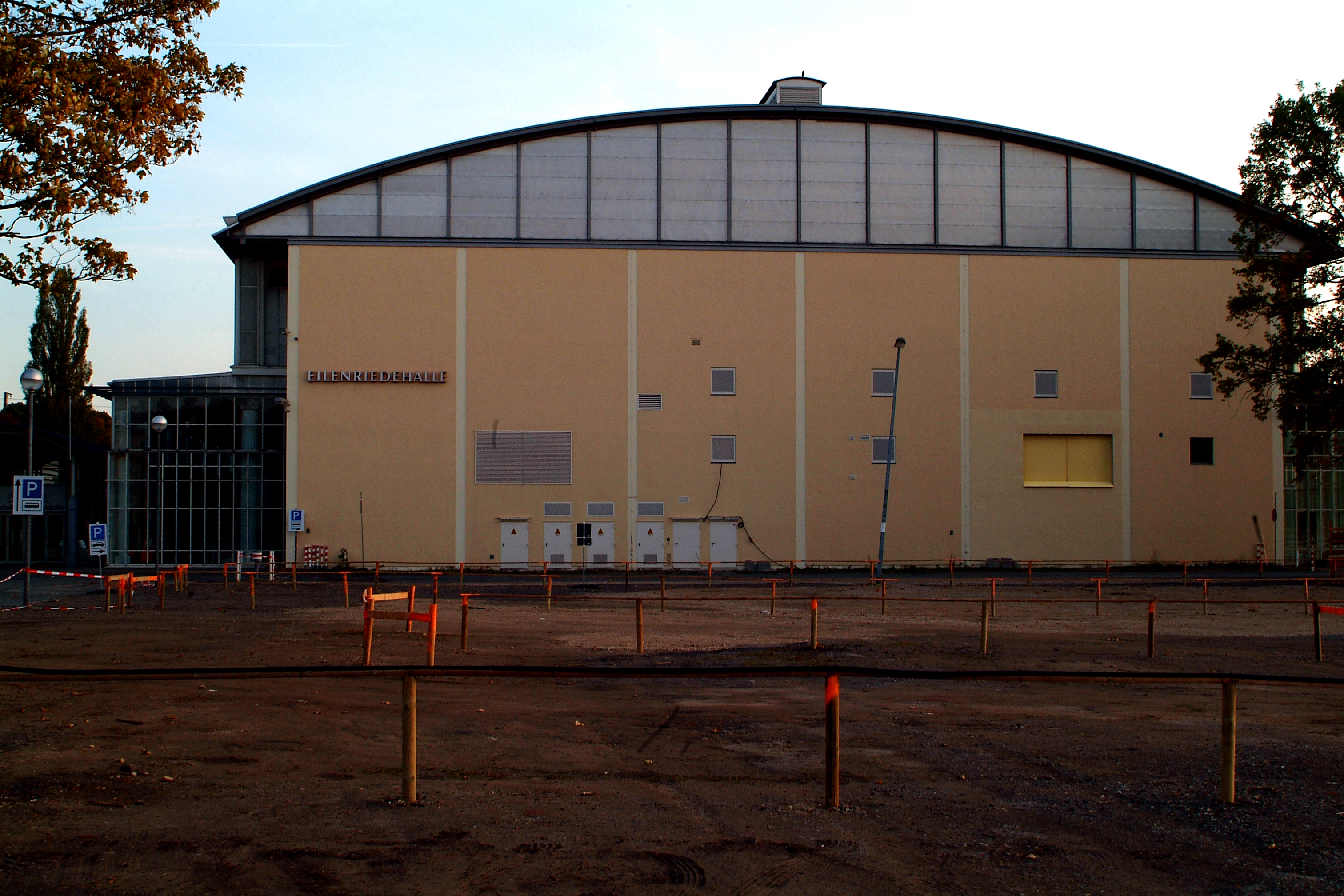 Blick auf die Kopffront der Eilenriedehalle vom bisher unbefestigten Parkplatz aus, anstelle dessen bis 2012 ein Parkhaus errichtet werden soll.